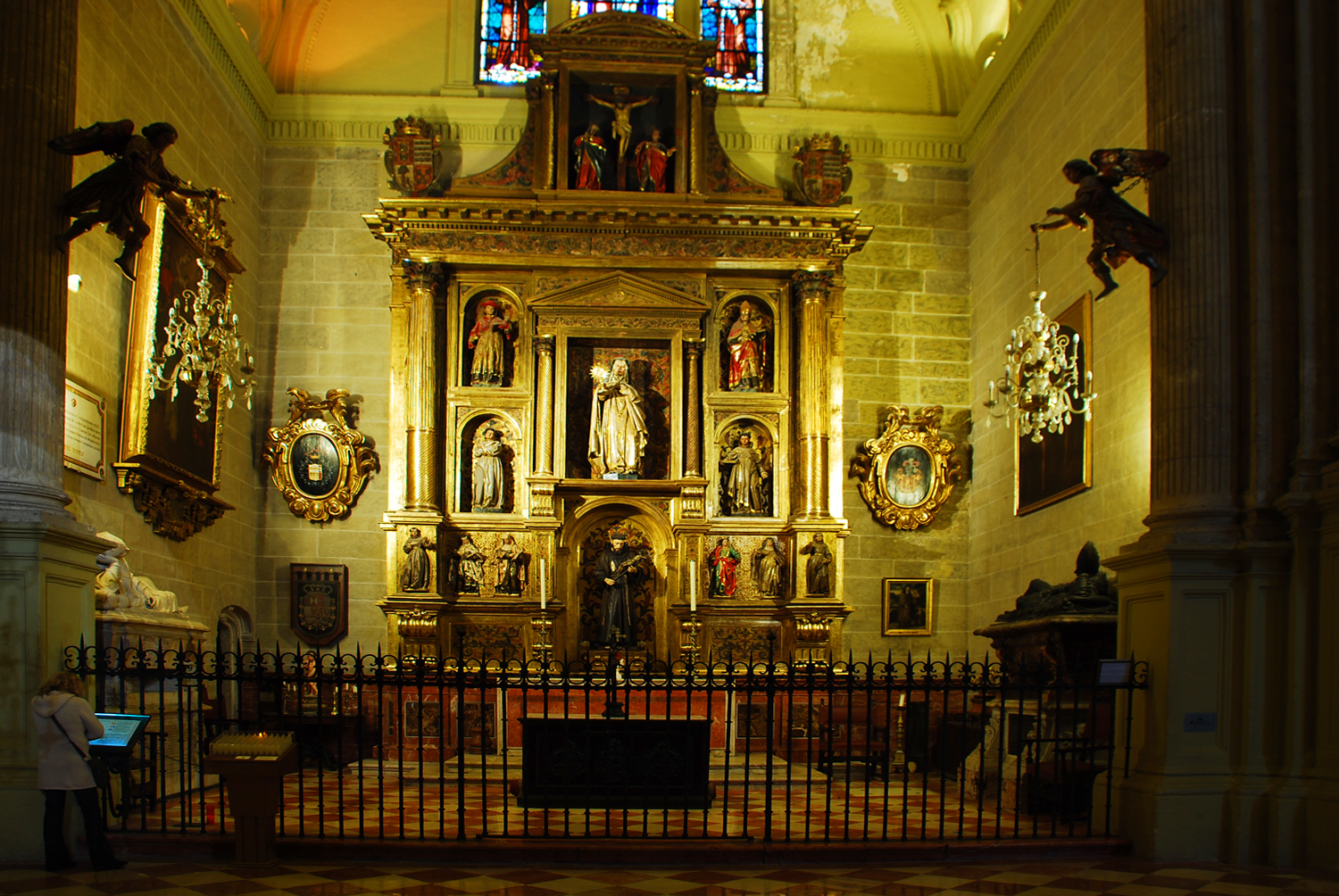 Malaga Cathedral, San Francisco de Asís chapel